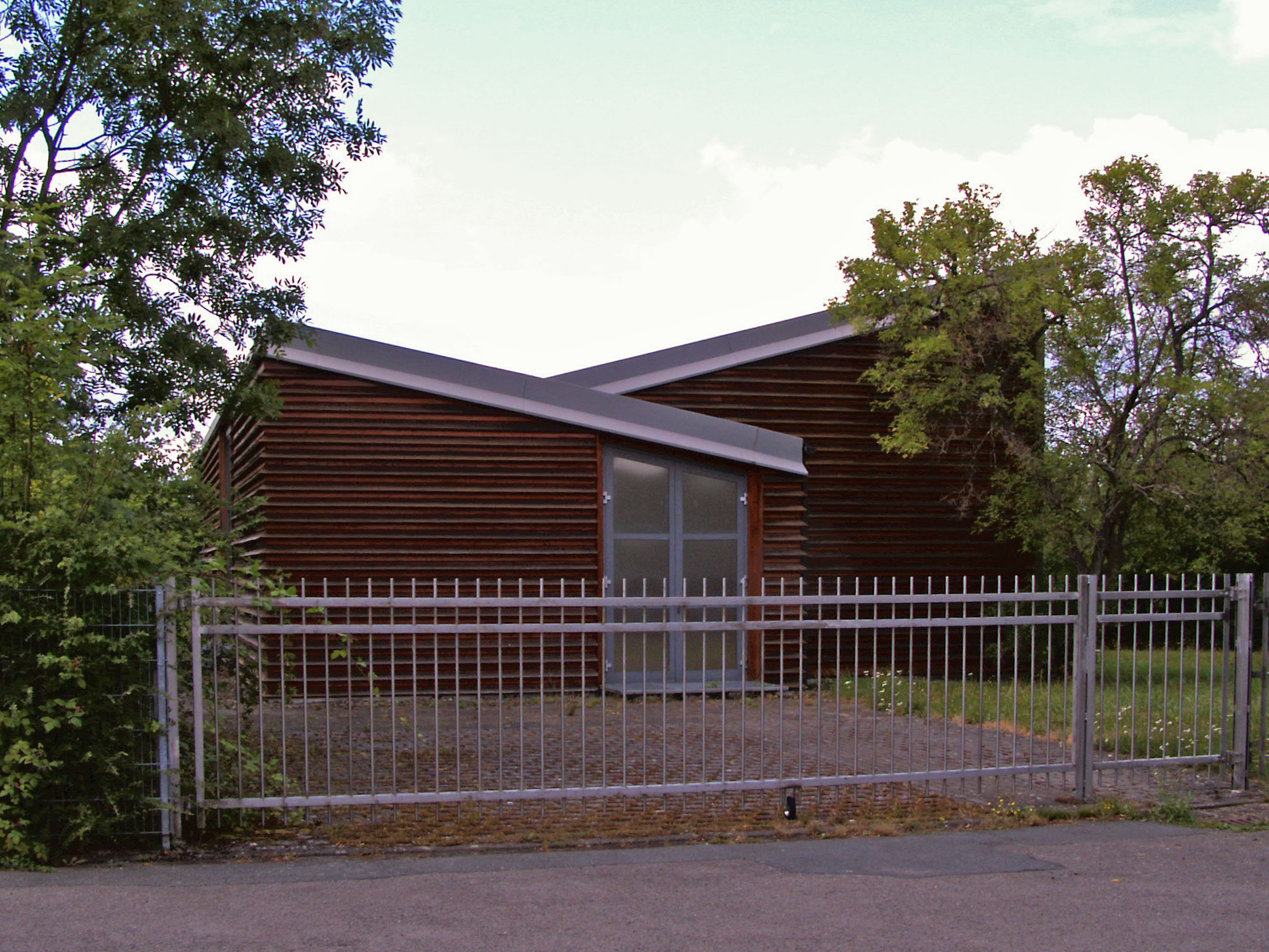 Ehemaliges katholischen Kirchhaus St. Christophorus in Dörnten.